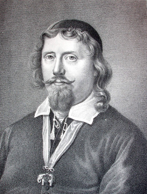 Corfitz Ulfeldt f. 10. juli 1606 på Hagenskov slot ved Assens, d. mellem 14. og 20. februar 1664.